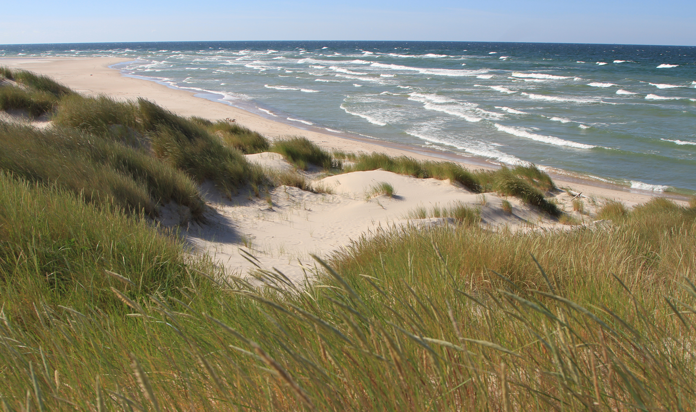 Gotska Sandön sand beach